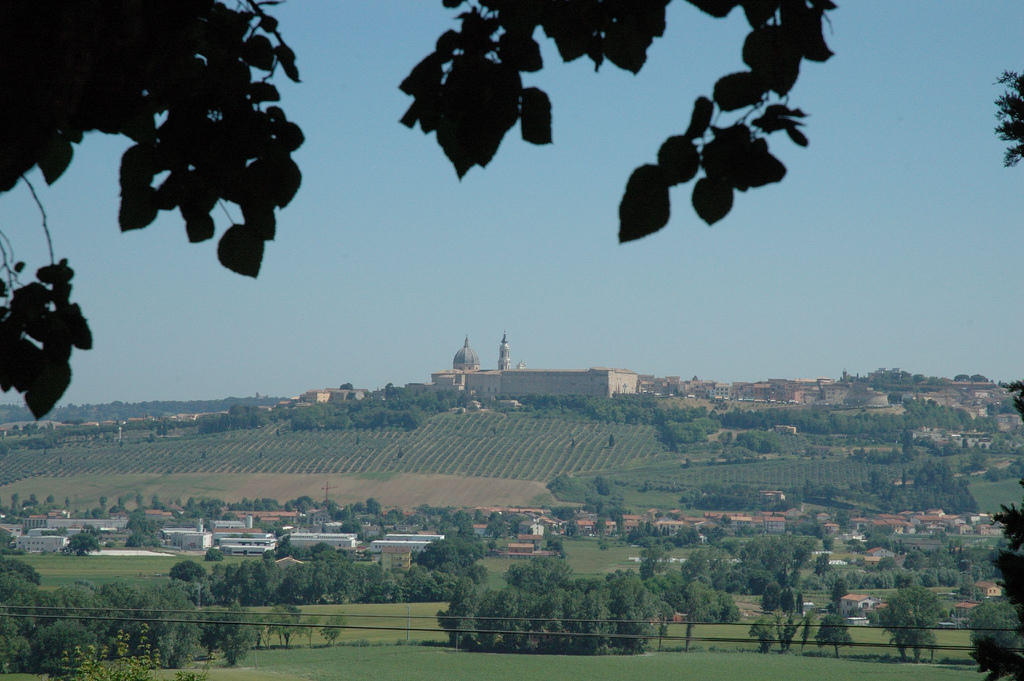 Loreto, Marche, Italia